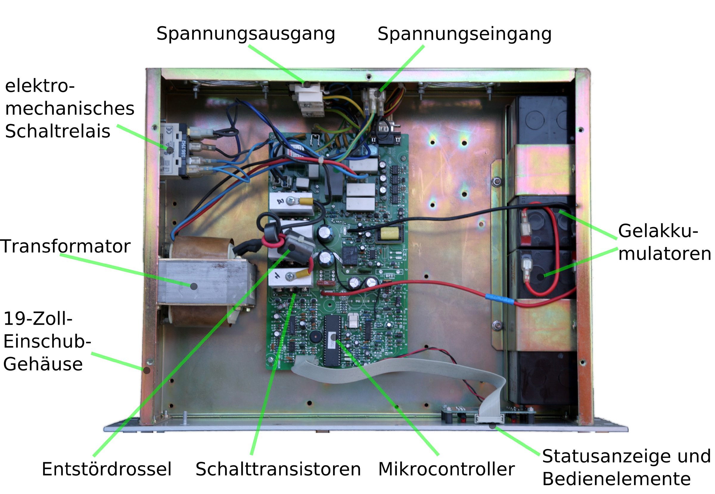 Aufbau einer unterbrechungsfreien Stromversorgung (USV) in einem 19-Zoll-Einschub.